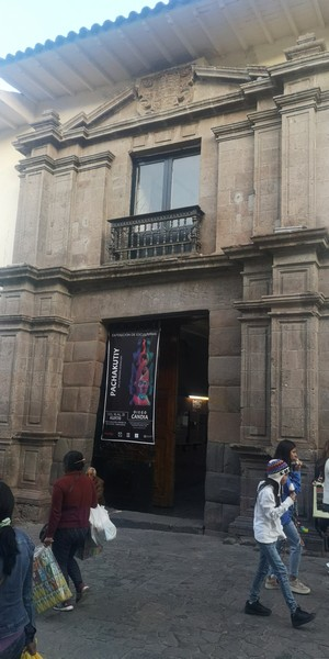 Puerta principal de la casa del Marqués de Valleumbroso, Calle Marqués, Cusco, Perú